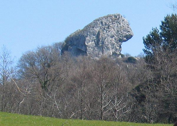 particolare della Morgia Sant'Angelo o Leonessa, masso calcareo simile ad un felino - Cerreto Sannita (Bn)